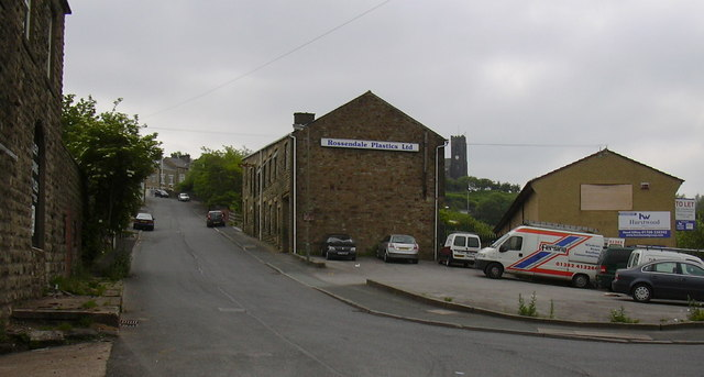 Station Road Haslingden